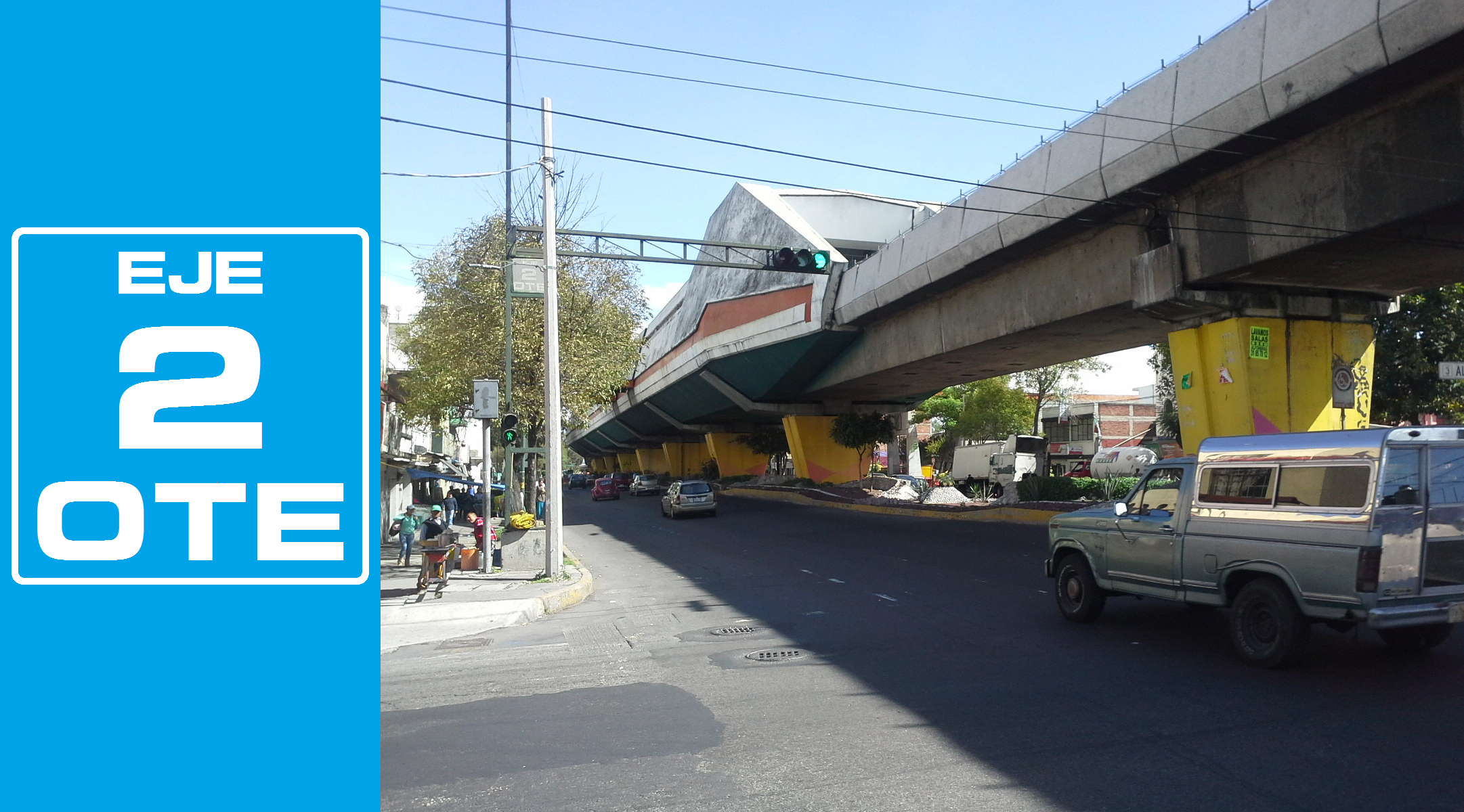 Rediseñado original de la señalética de los Ejes viales de la Ciudad de México por José García (Wiki ID: narumiyama)